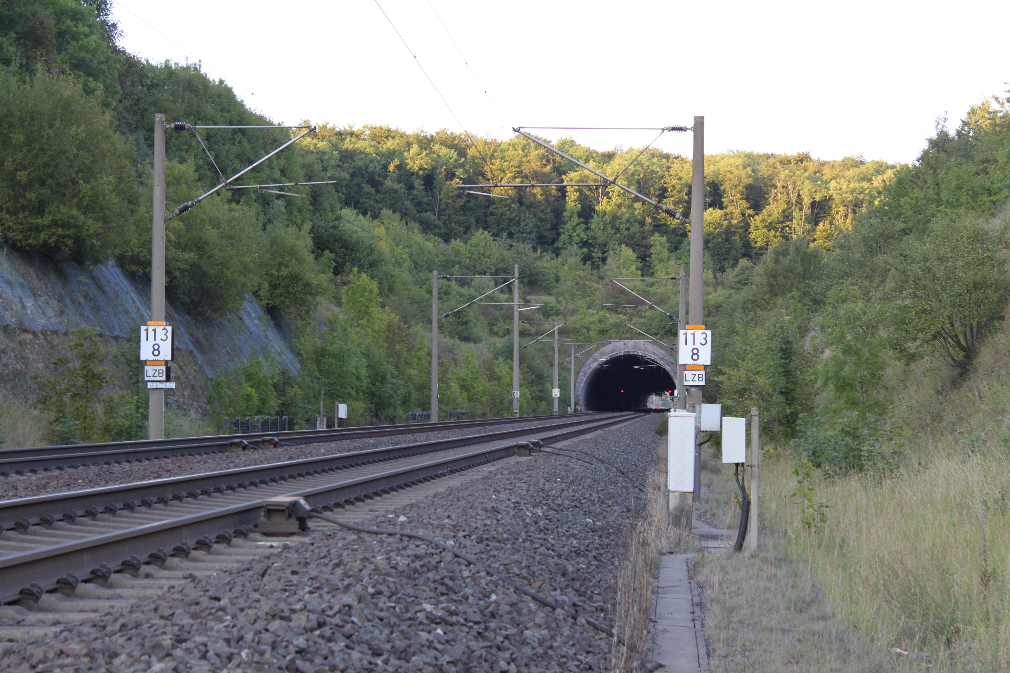 Blick auf das Südwestportal des Mackenroddtunnels. Im Tunnel sind die südlichen Einfahrsignale für den Überholbahnhof Jühnde zu erkennen.